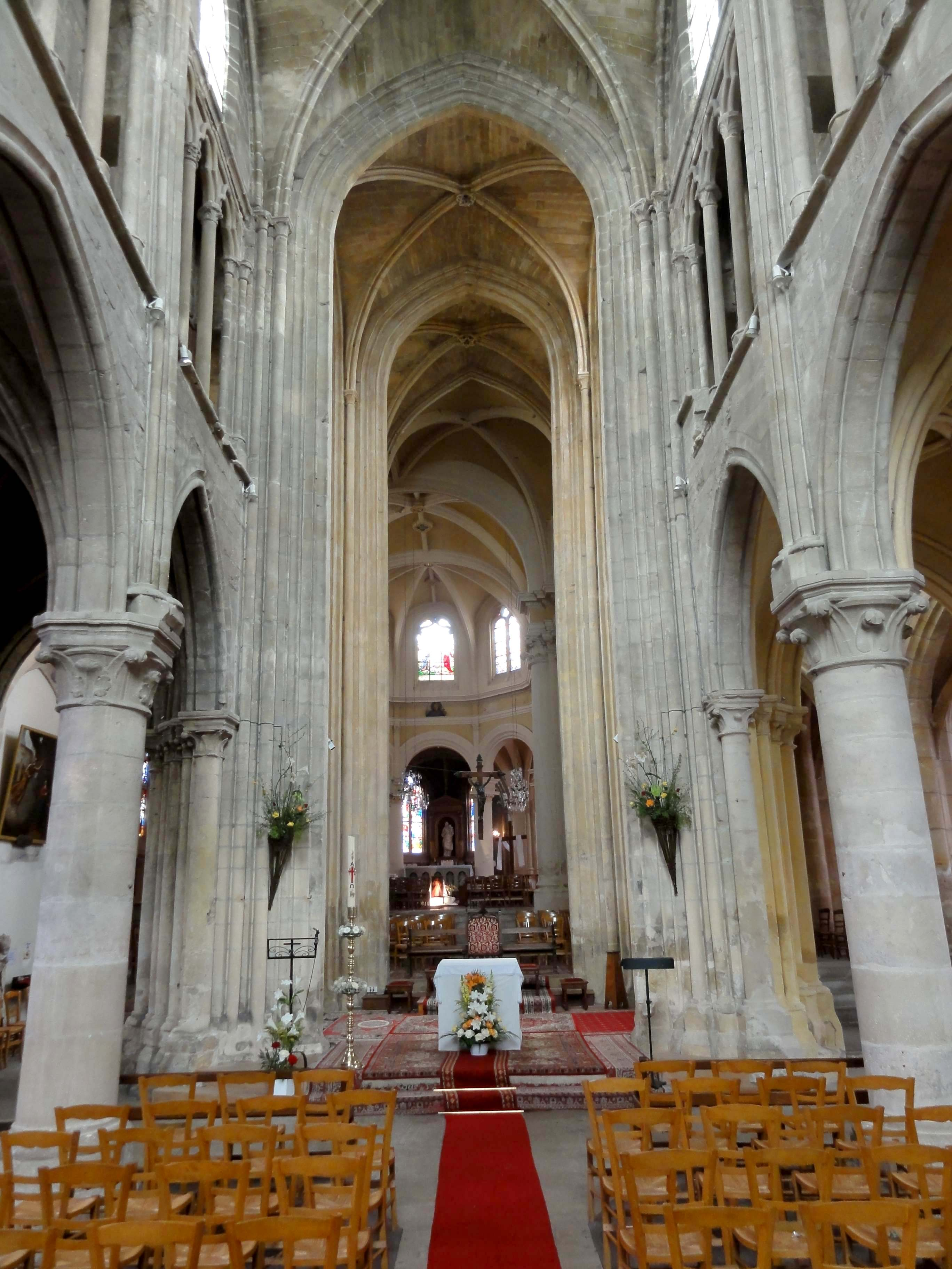 Intérieur de l'église - voir titre.